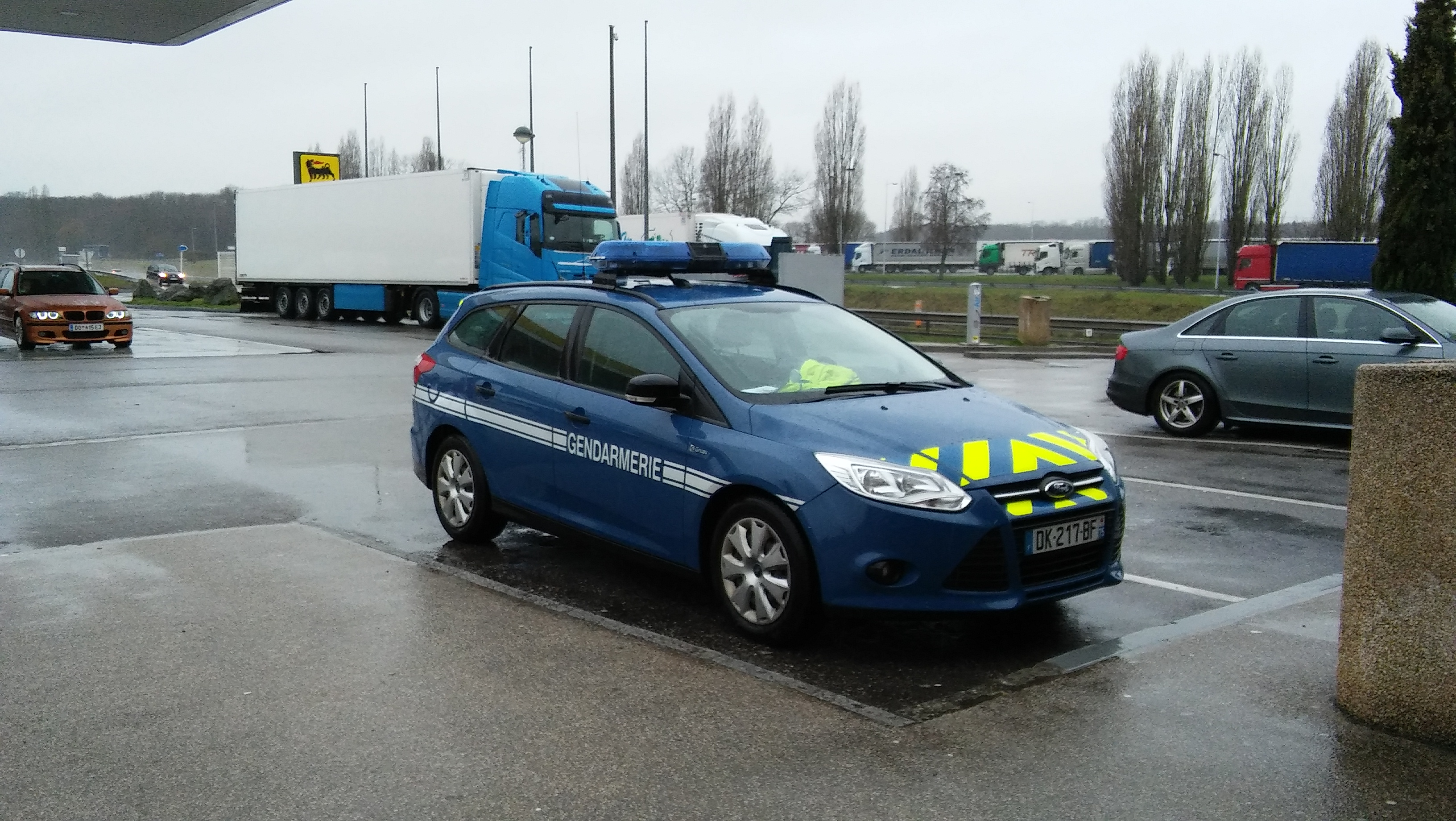 Une Ford focus de la gendarmerie nationale aux alentours de Metz, sur une aire d'autoroute.